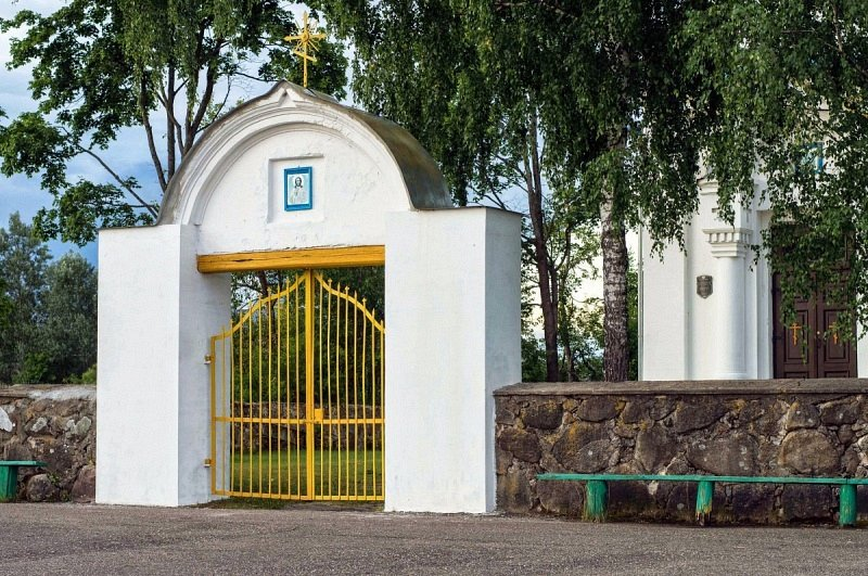 Ручыца. Царква. Агароджа